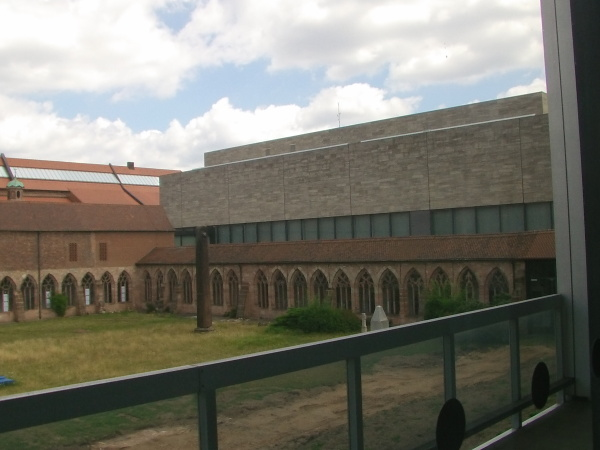 Blick in den großen Hof